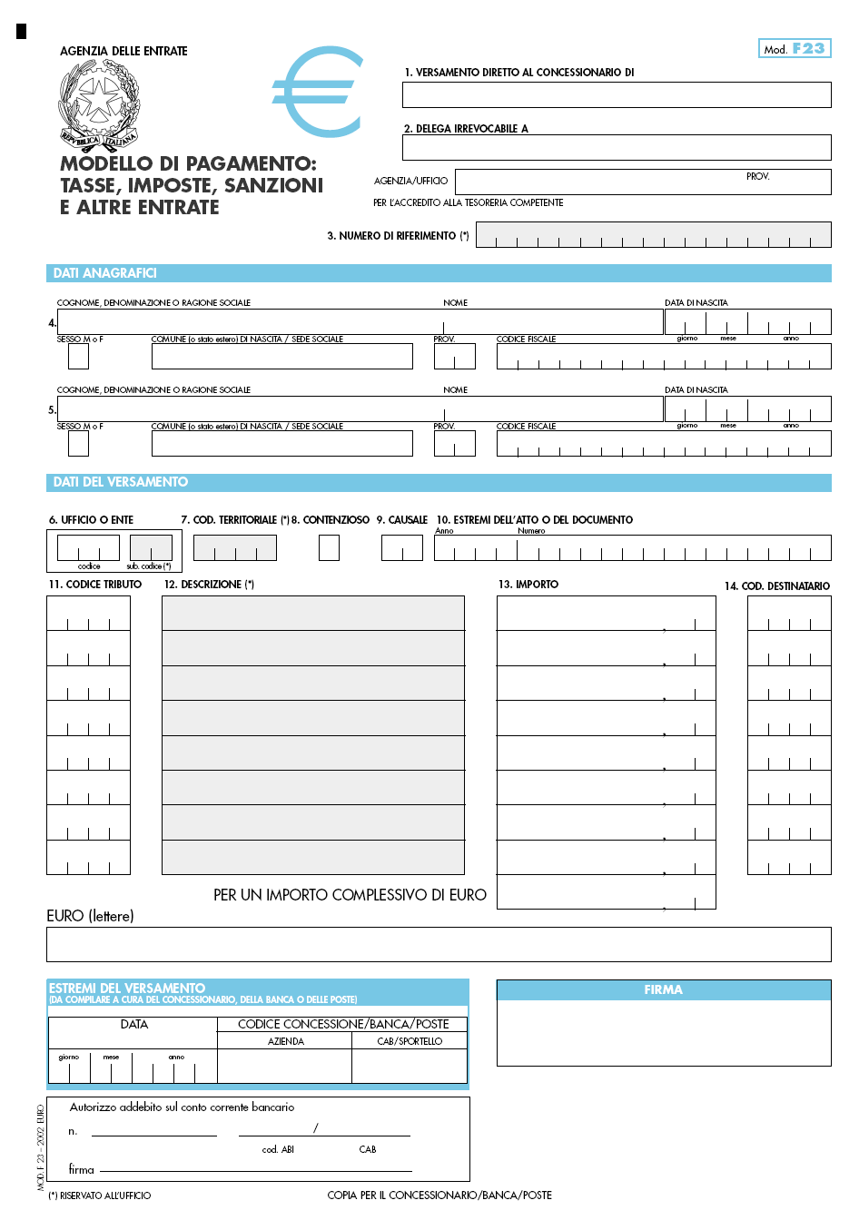 Modello unificato di pagamento F23